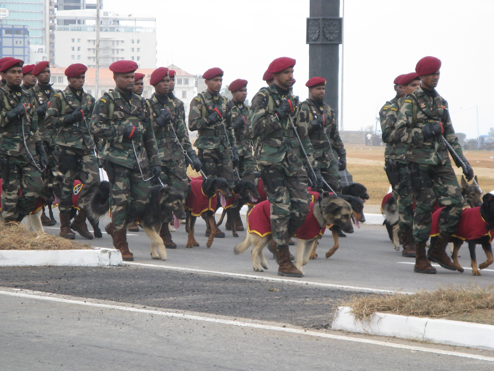 Sri Lanka Army